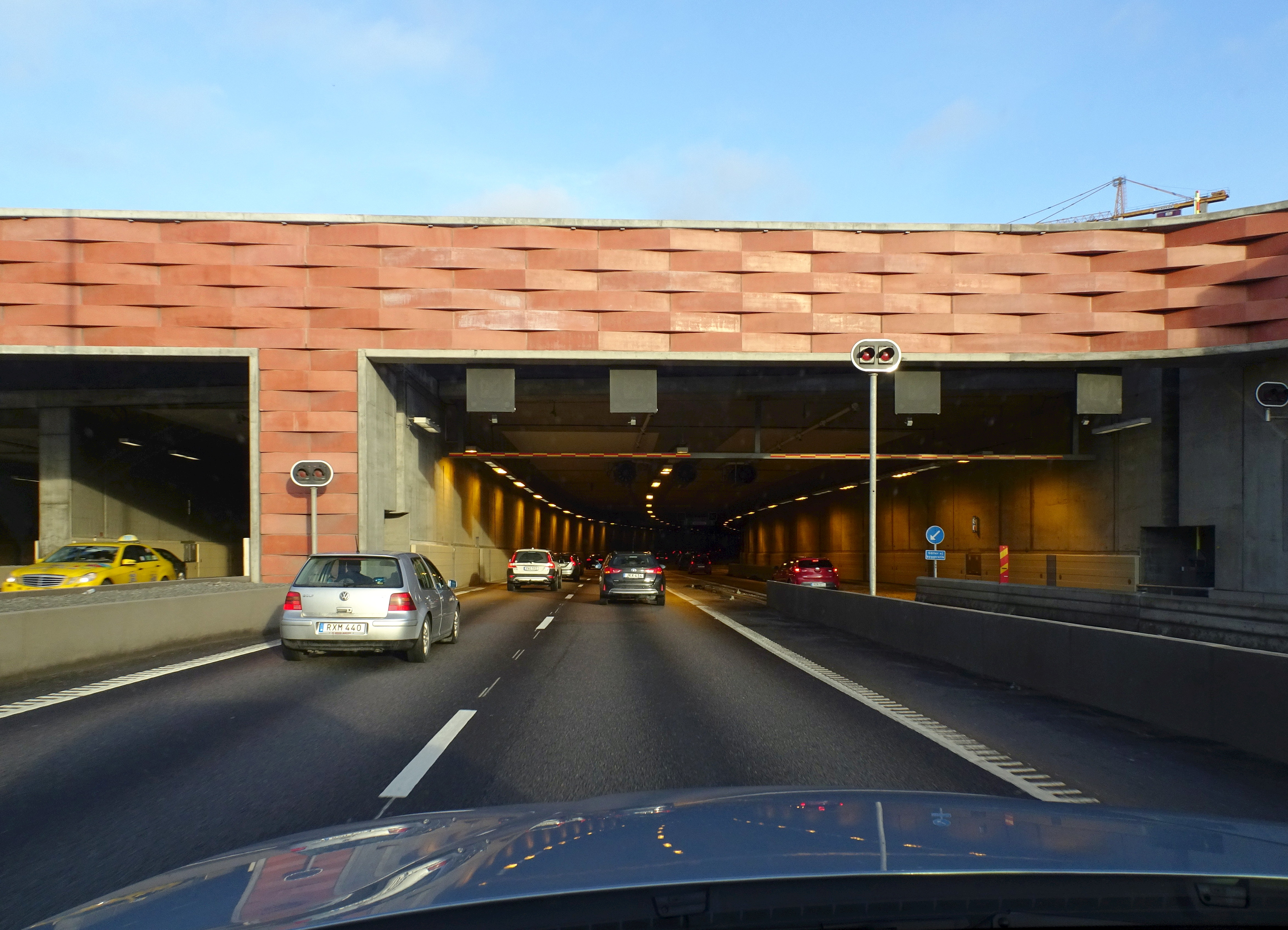 Norra Länken tunnelinfart från väster